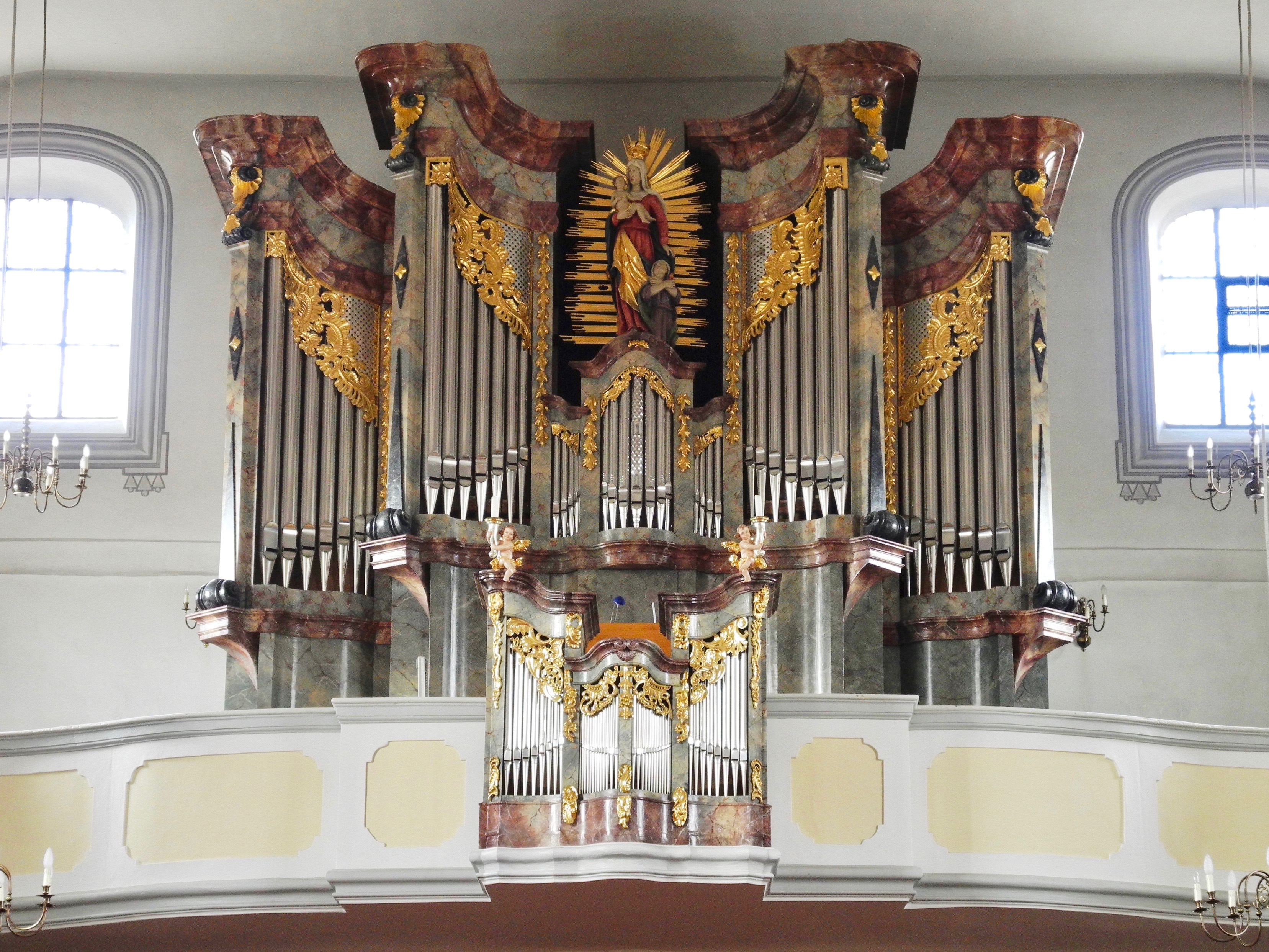 2005 Neubau Vleugels